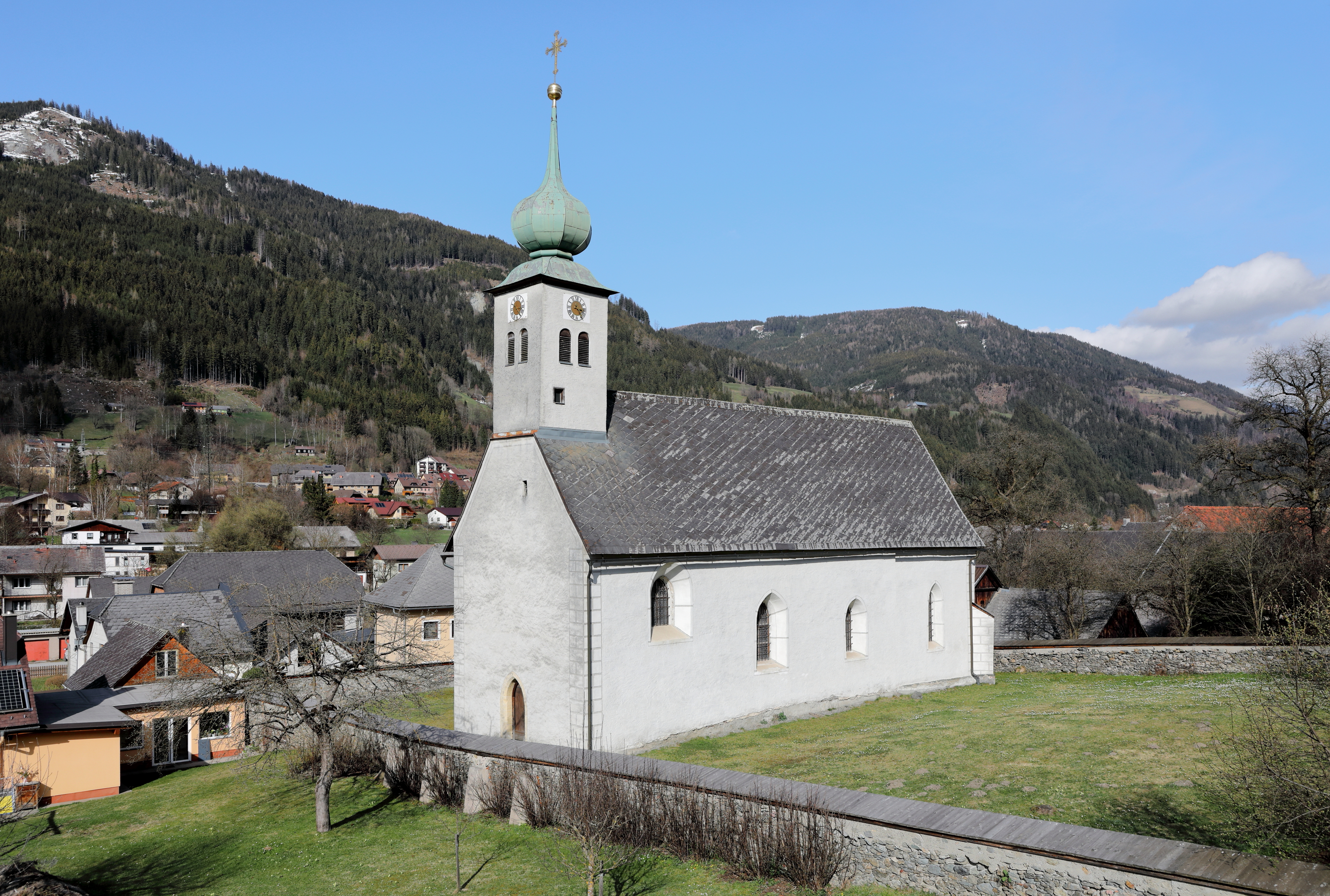 Westsüdwestansicht der röm.-kath. Filialkirche hl. Georg in der steirischen Stadtgemeinde Rottenmann.Ursprünglich 1042 als erste Rottenmanner Pfarrkirche im romanischen Stil errichtet. Nach mehrmaliger Zerstörung immer wieder aufgebaut bzw. instand gesetzt.